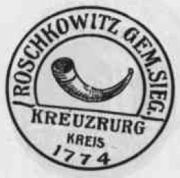 Altes Siegel der Gemeinde Roschkowitz im Kreis Kreuzburg OS.